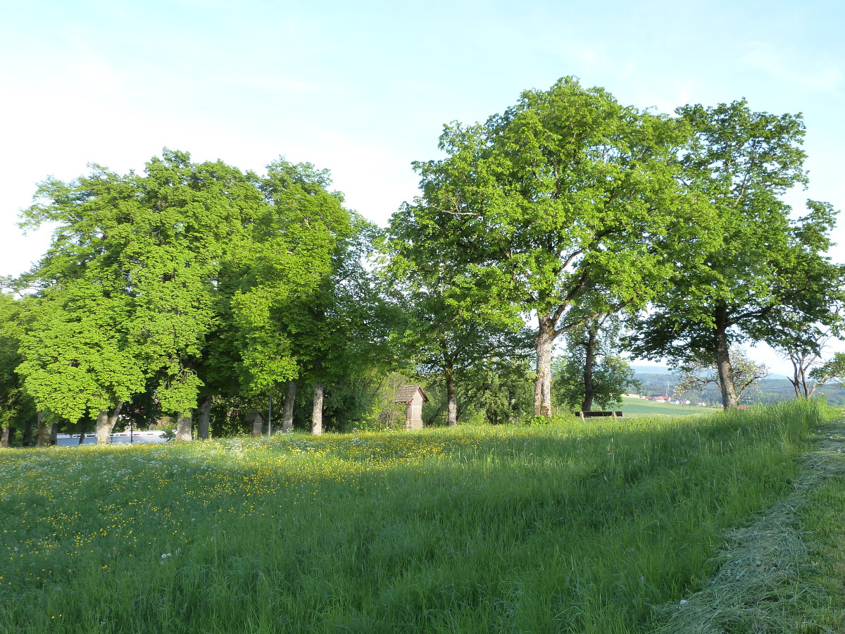 (LSG:BW-1.36.020)_Hohenberg, Landschaftsschutzgebiet Hohenberg, Allee zur Kirche hoch (von der Seite), Ostalbkreis, Baden-Württemberg